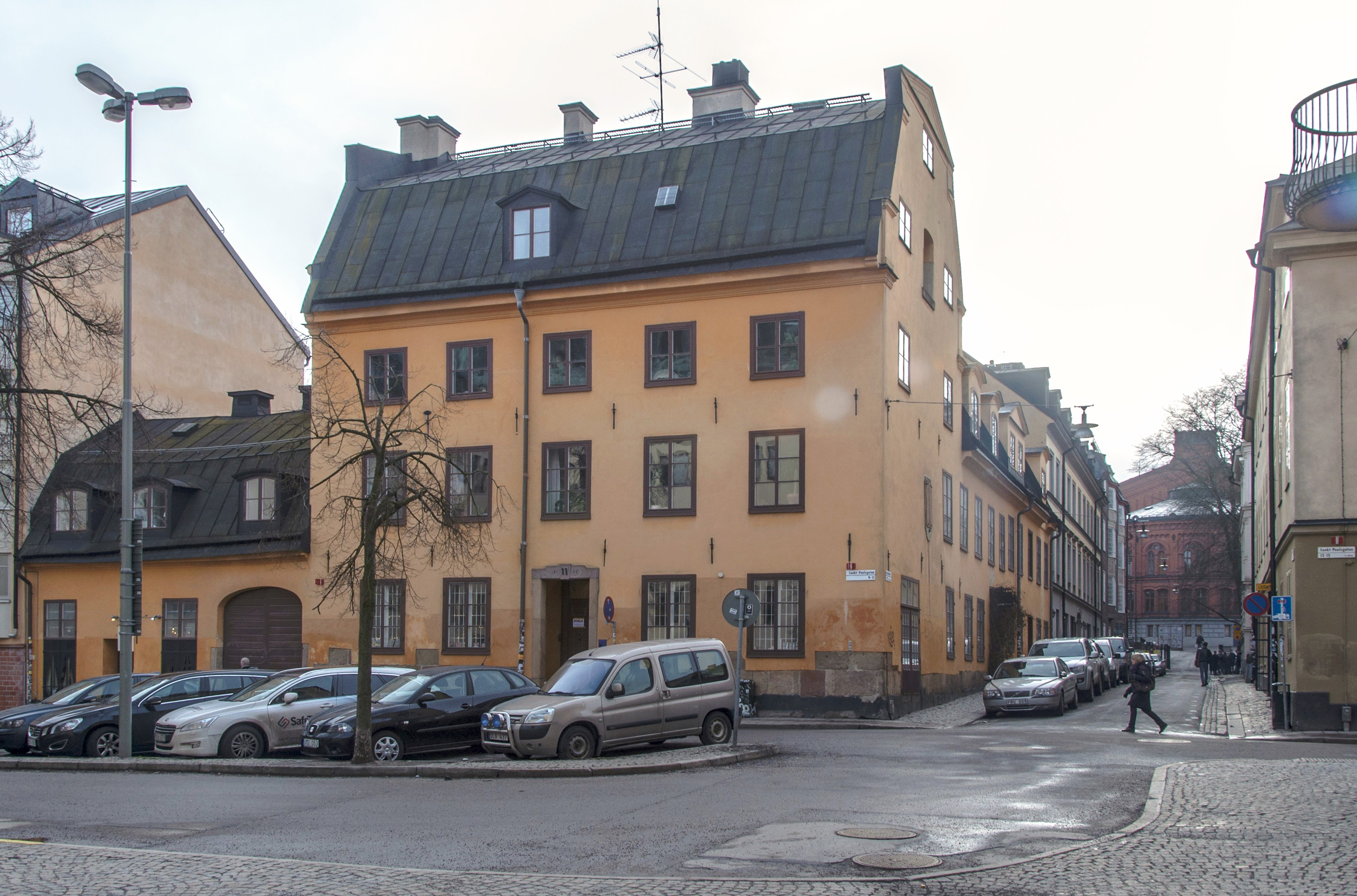 Monteliushuset på S:t Paulsgatan. Byggt 1670 till kaplanen i Storkyrkan Johannes Petri Kellingius. Arkeologen och riksantikvarien Oscar Montelius föddes och dog i huset.